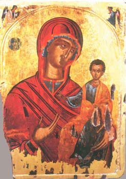 БОГОРОДИЦА СО ХРИСТОС крај на 16 или почеток на 17 век. црква Воведение,Карпински манастир, Куманово. дрво,штук,темпера